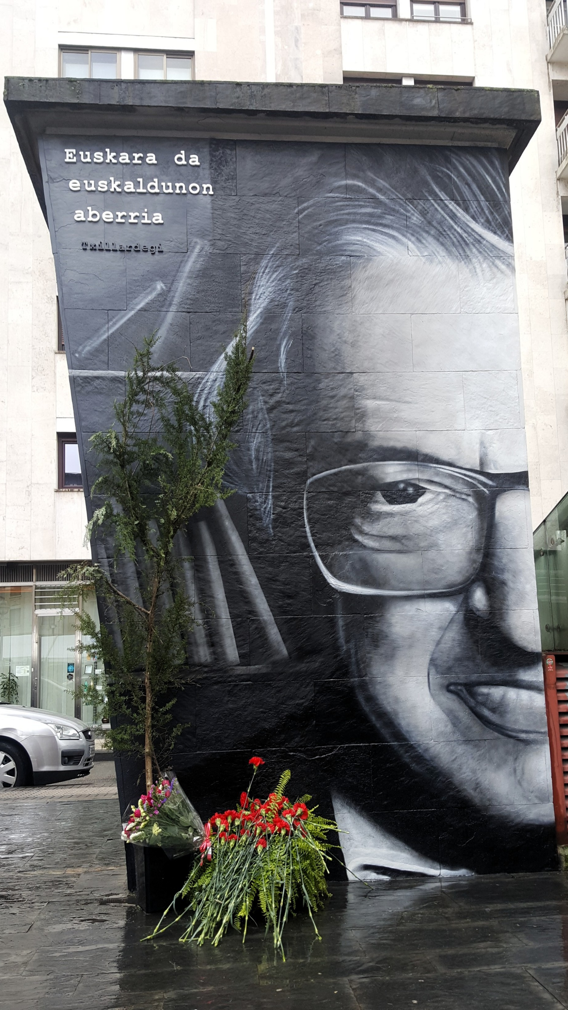 Txillardegiren omenez Donostiako Gaskuña plazan jarritako murala inaugurazio-egunean